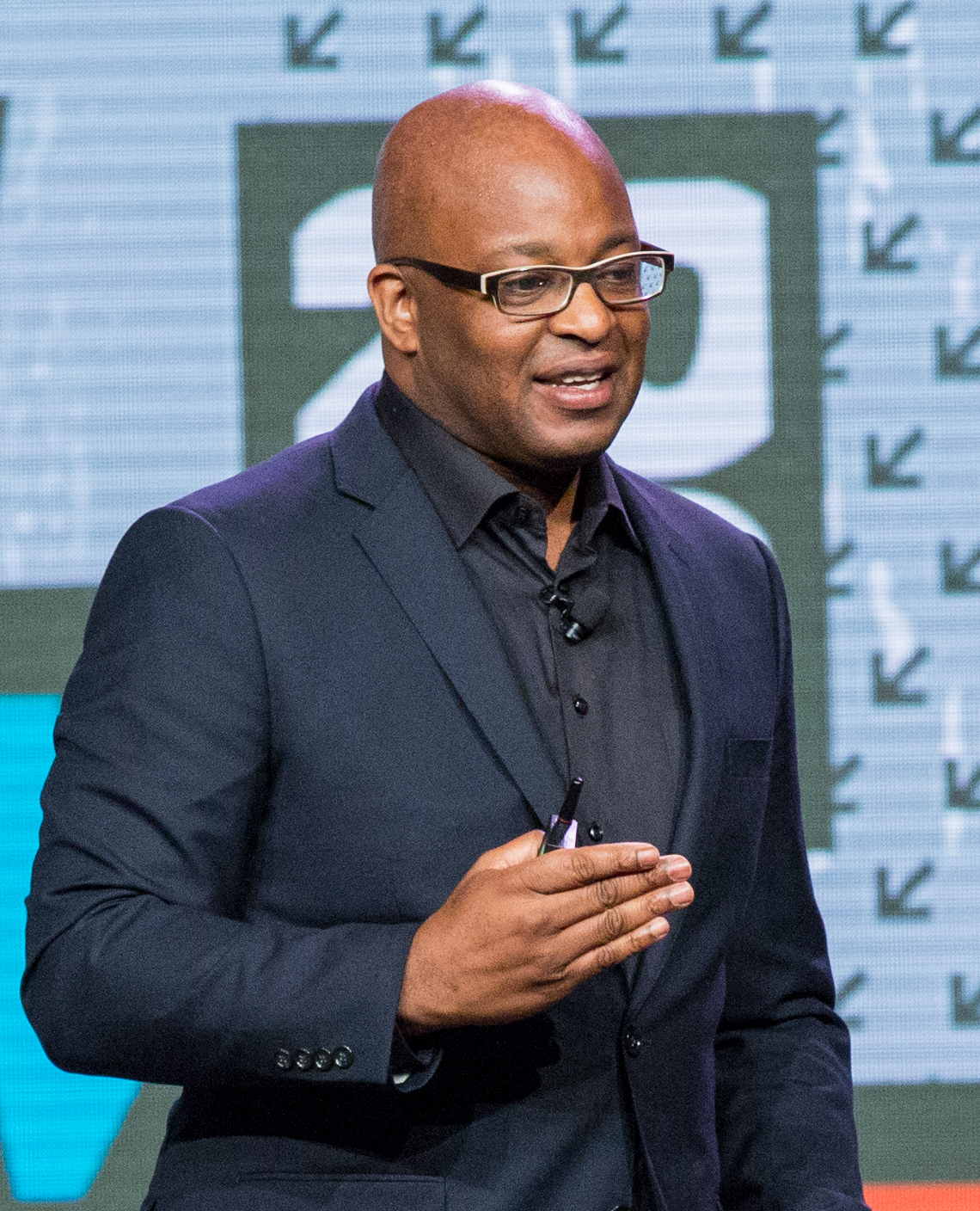 Frank Cooper III